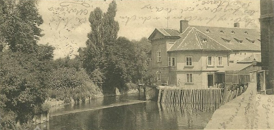 Ronzův mlýn v Karlíně - pohlednice z roku 1899